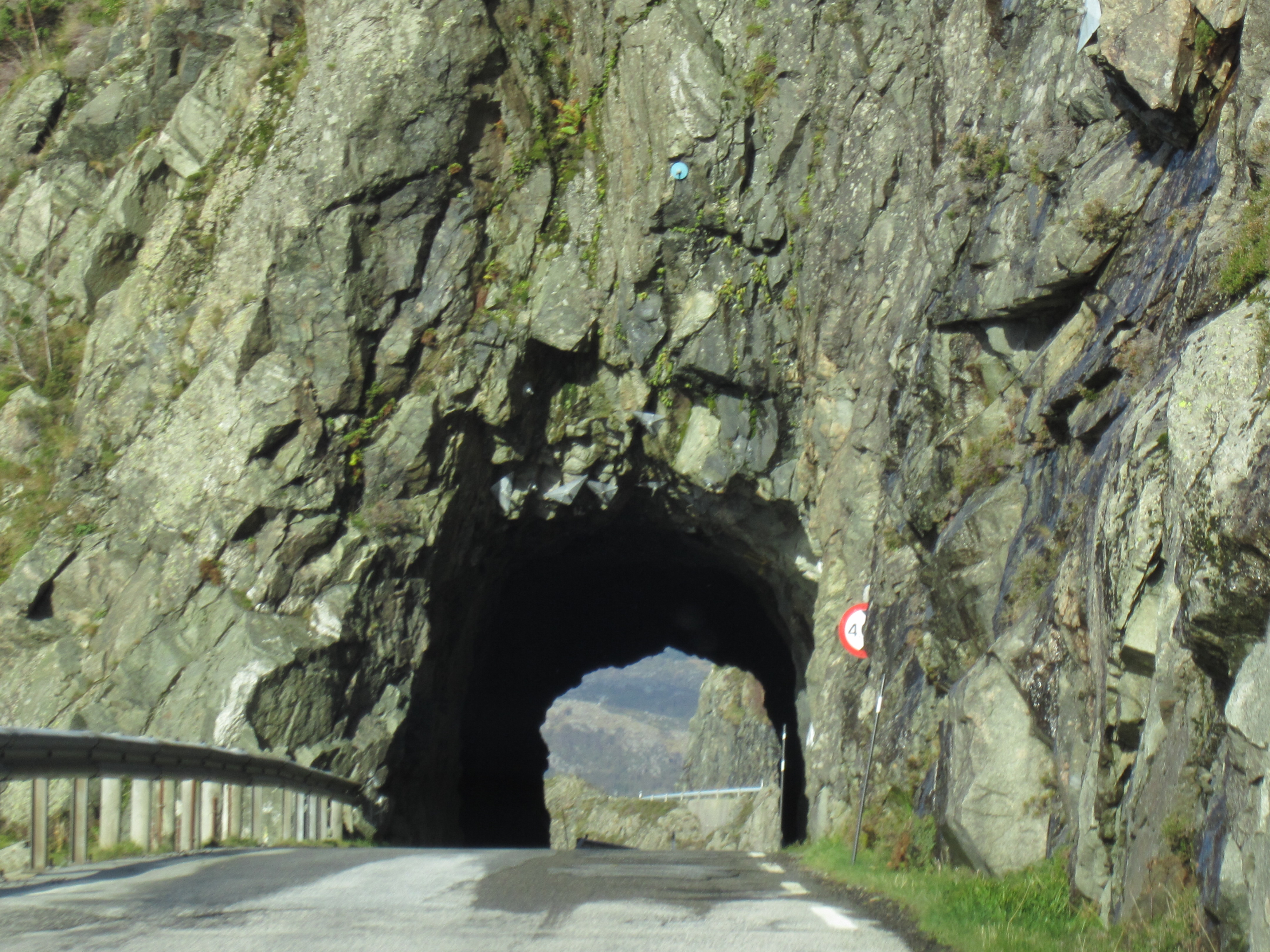 Stigabergtunnelen i Askvoll kommune i Sogn og Fjordane fylke i Noreg.